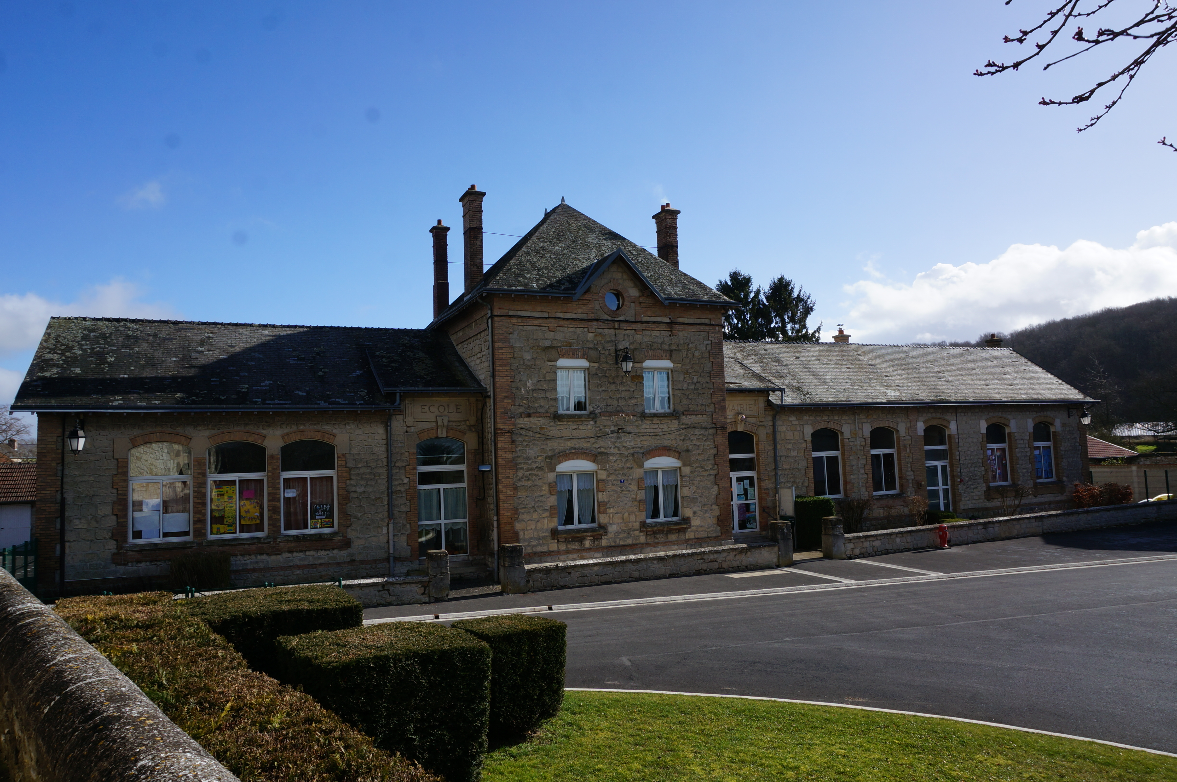 vue de la mairie de Prouvais.